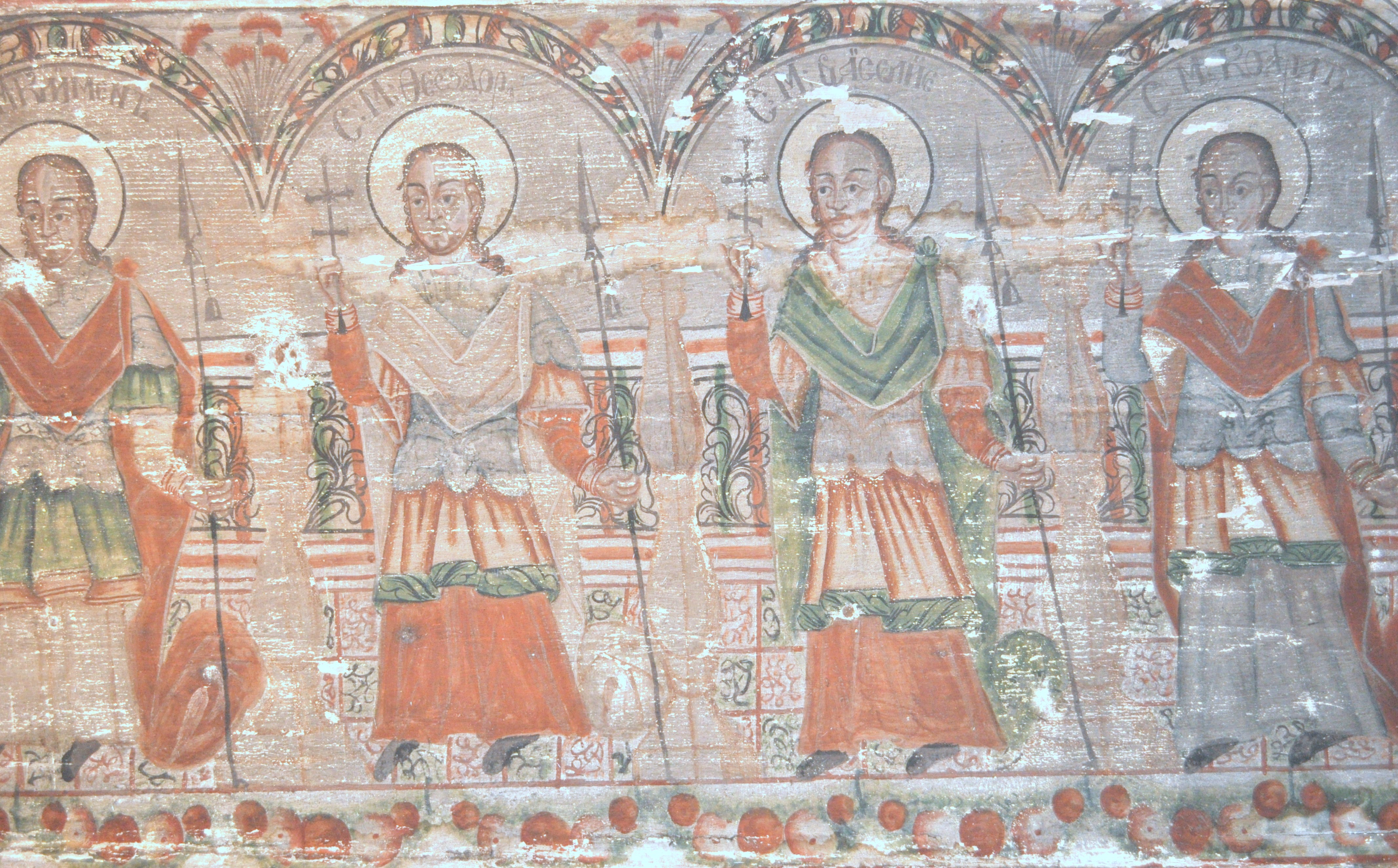 Biserica de lemn din Nadășu, județul Cluj